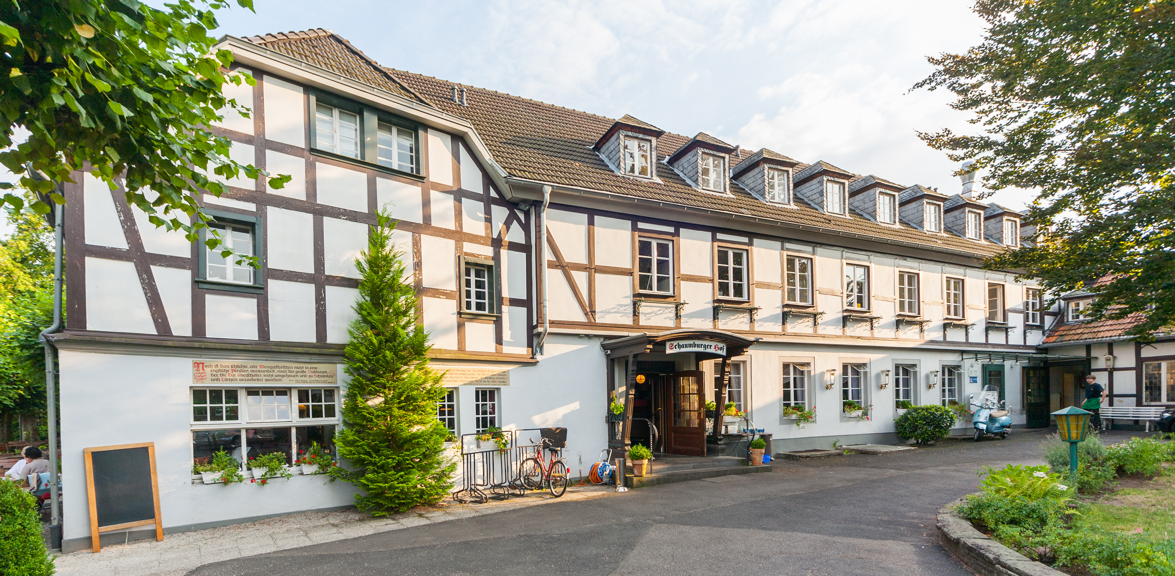 Schaumburger Hof, Am Schaumburger Hof 10, Bonn: Ansicht aus Nord-Ost